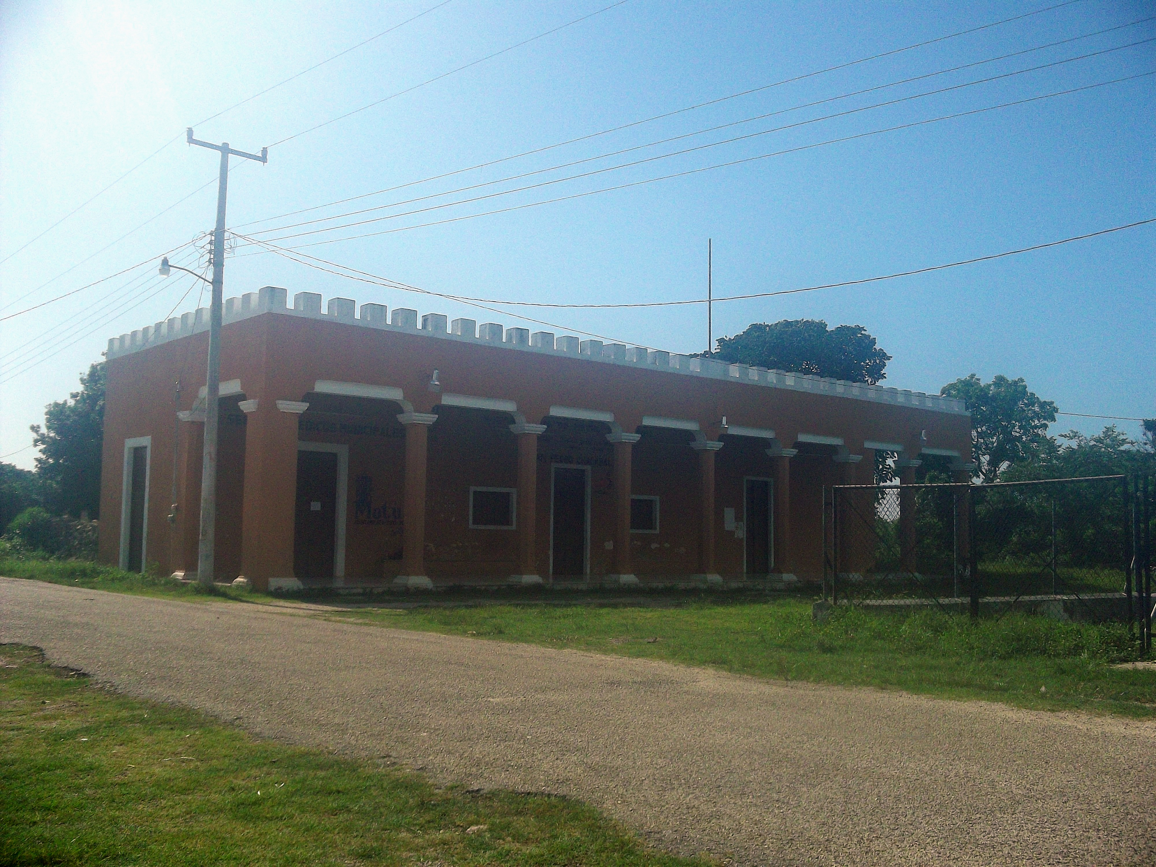 Casa comisarial de San Pedro Chacabal, Yucatán.